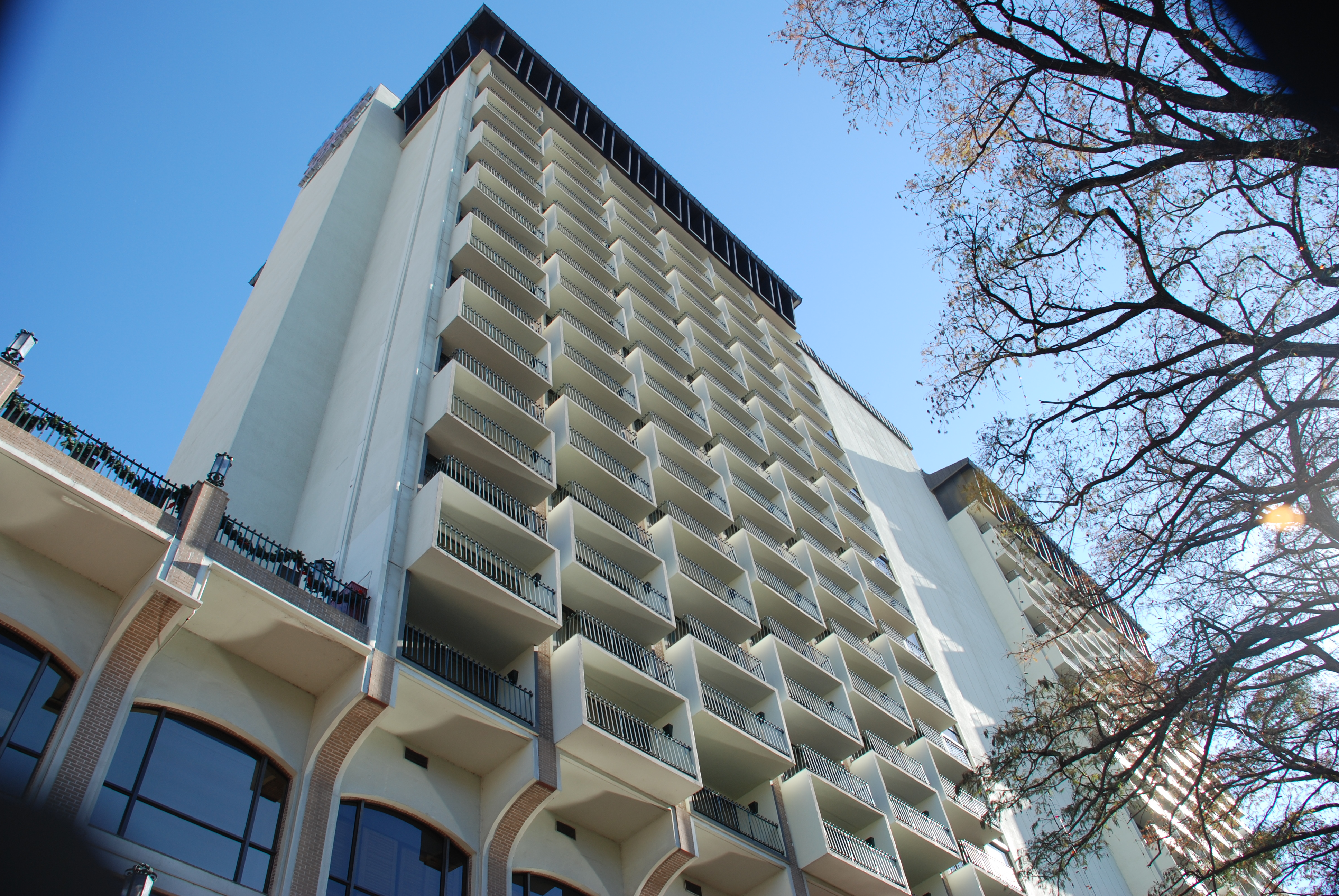 Hilton Palacio del Rio in San Antonio, TX